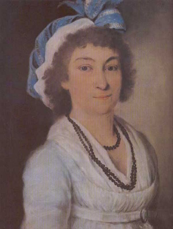 Sophia Weber